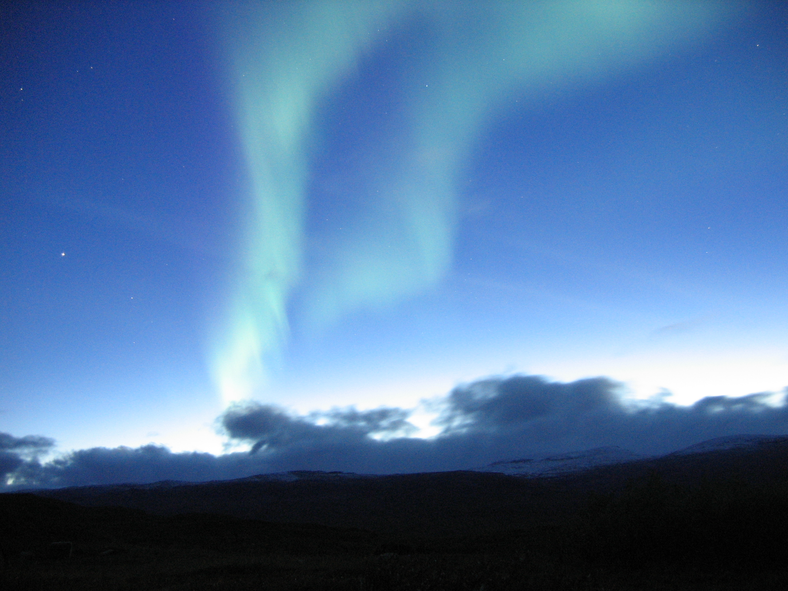 Picture taken at Tältlägret, near Abisko, Kiruna Kommun, Lappland, Norrbotten, Sweden.